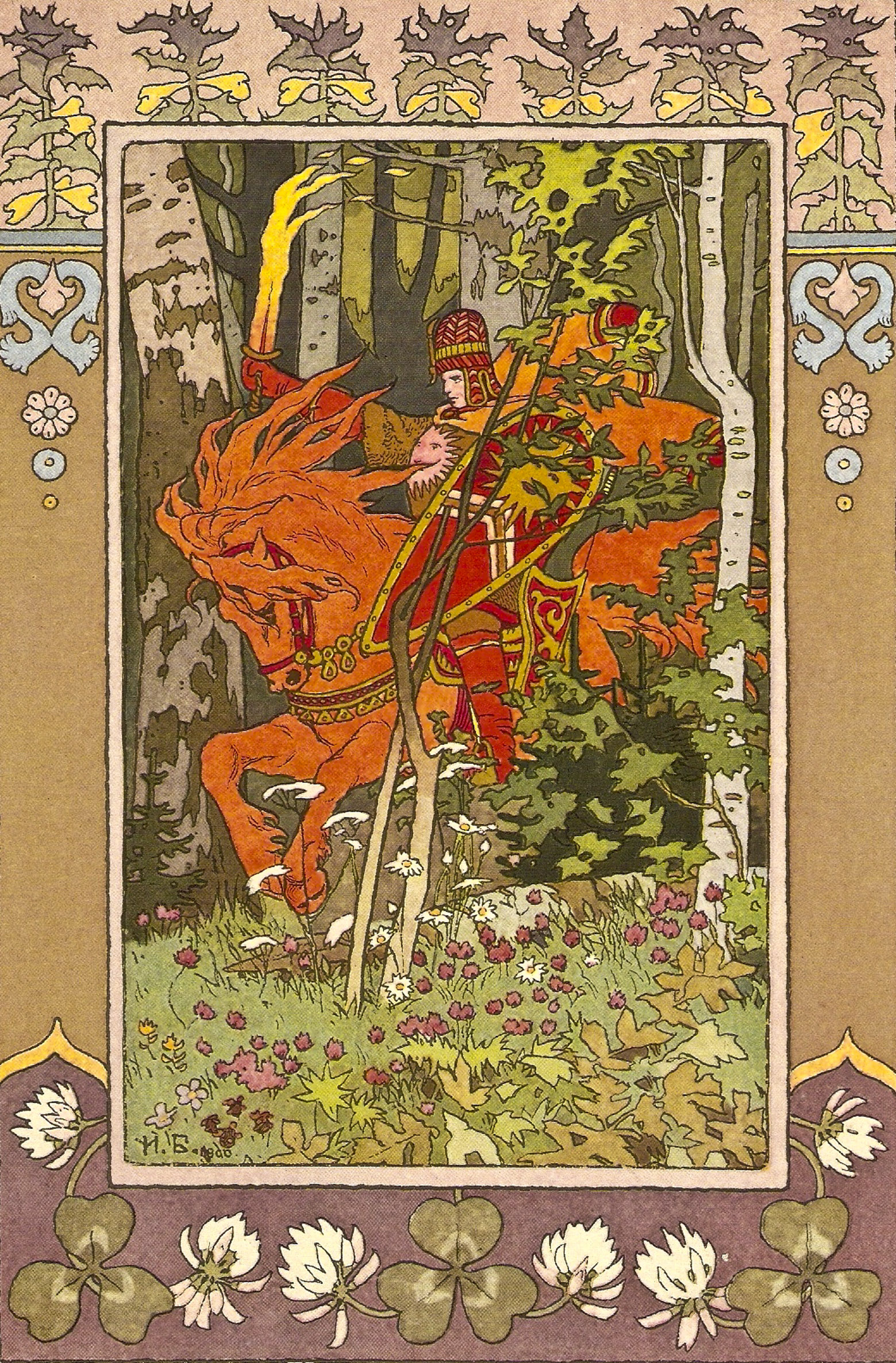 Le Cavalier rouge, par Ivan Bilibine, illustration pour le conte "Vassilissa-la-très-belle"